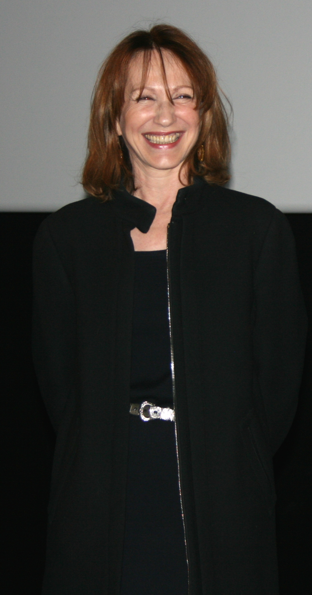 Nathalie Baye à l'avant-première de Passe-passe diffusée à l'UGC Ciné Cité Les Halles, à Paris.